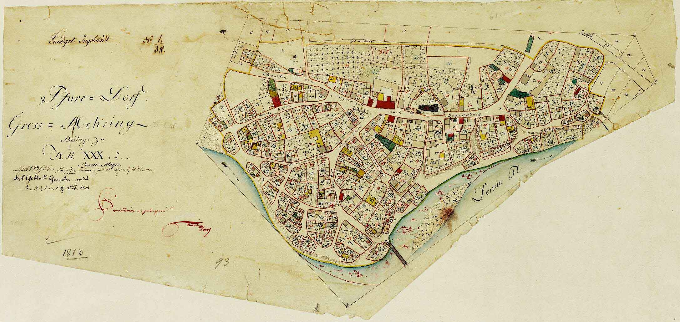 Historische Ortskarte von Großmehring von 1813. Maßstab: 1:2500.